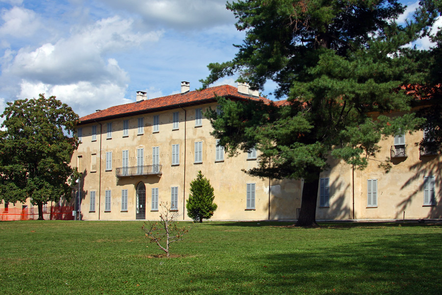 Villa Cicogna a Trecate (NO), facciata posteriore rivolta verso il parco